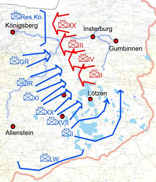 Slaget ved de Masuriske søer den 6. september 1914.